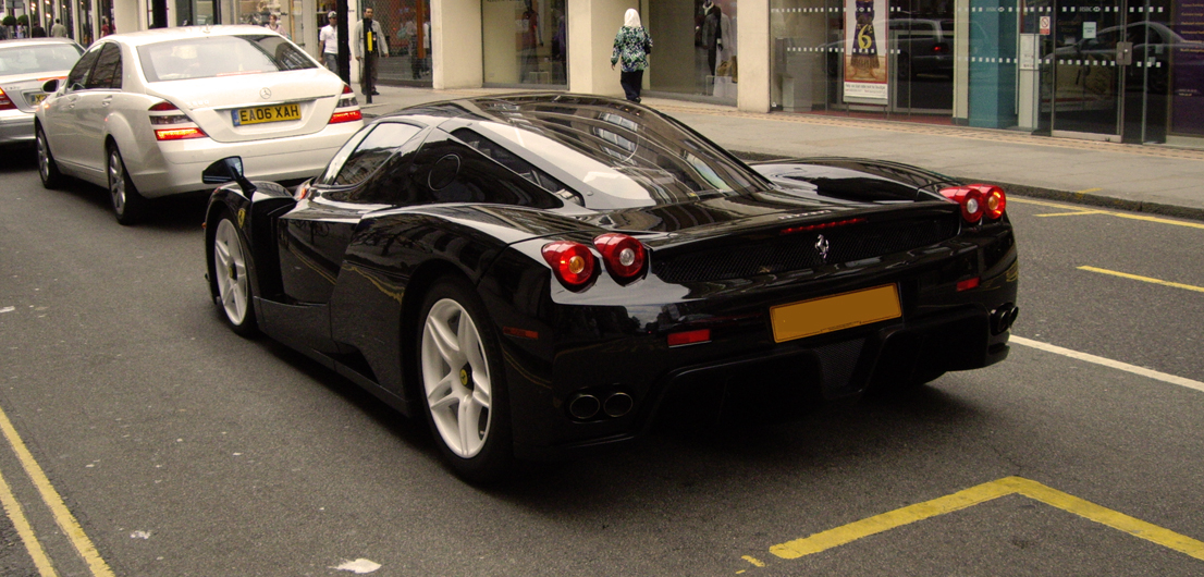 Ferrari Enzo